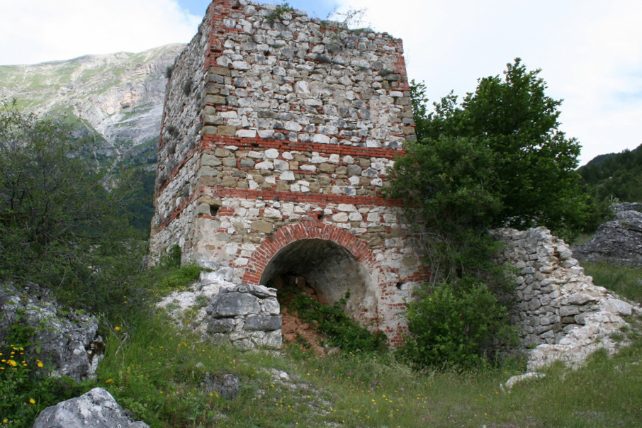 Sibilla.io, proprio scatto, Fornace di Pretare (Ascoli Piceno), esterno giorno, 17 giugno 2007,"Utilizzo concesso" This file is licensed under Creative Commons 2,5 license